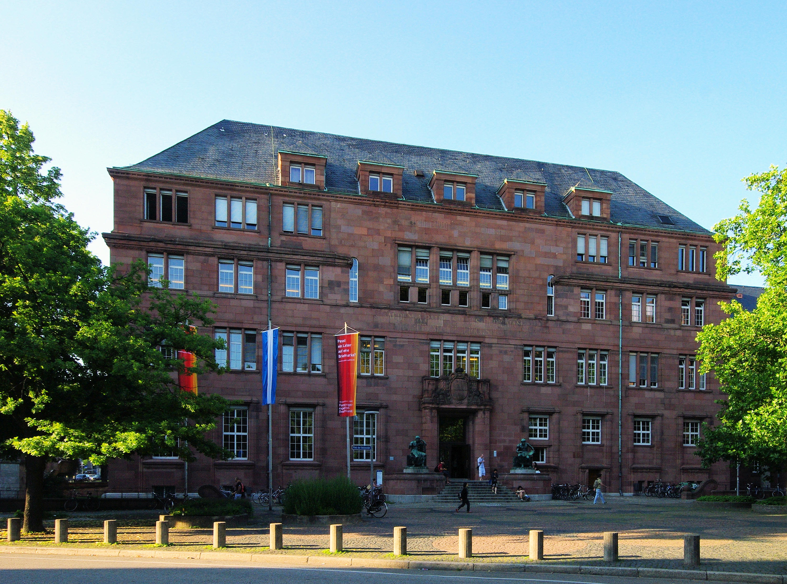 Das Kolleggebäude 1 der Universität Freiburg